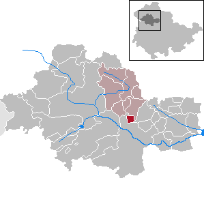 Kleinwelsbach in Thuringia - Unstrut-Hainich-Kreis